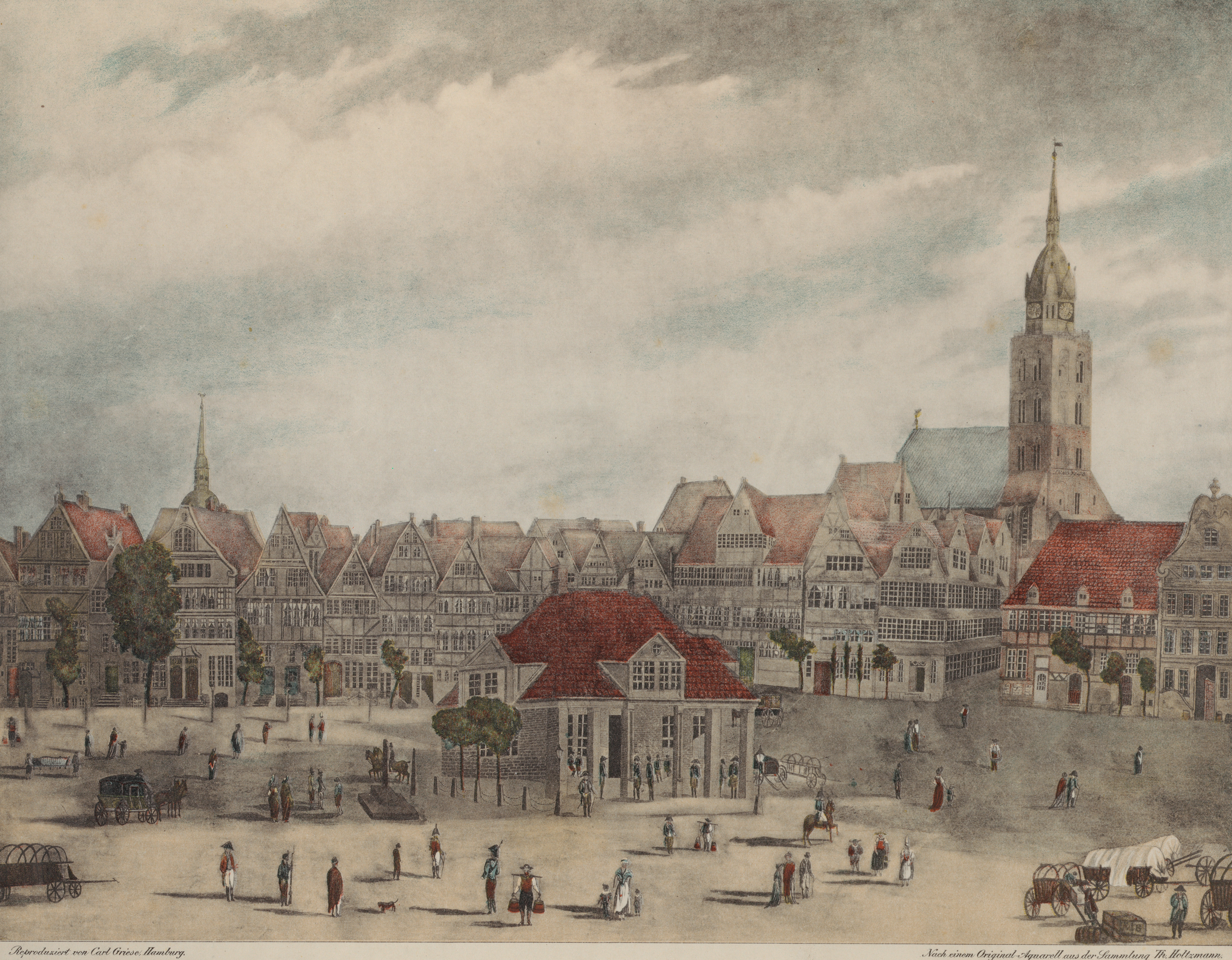 Der Pferdemarkt in Hamburg, 1796